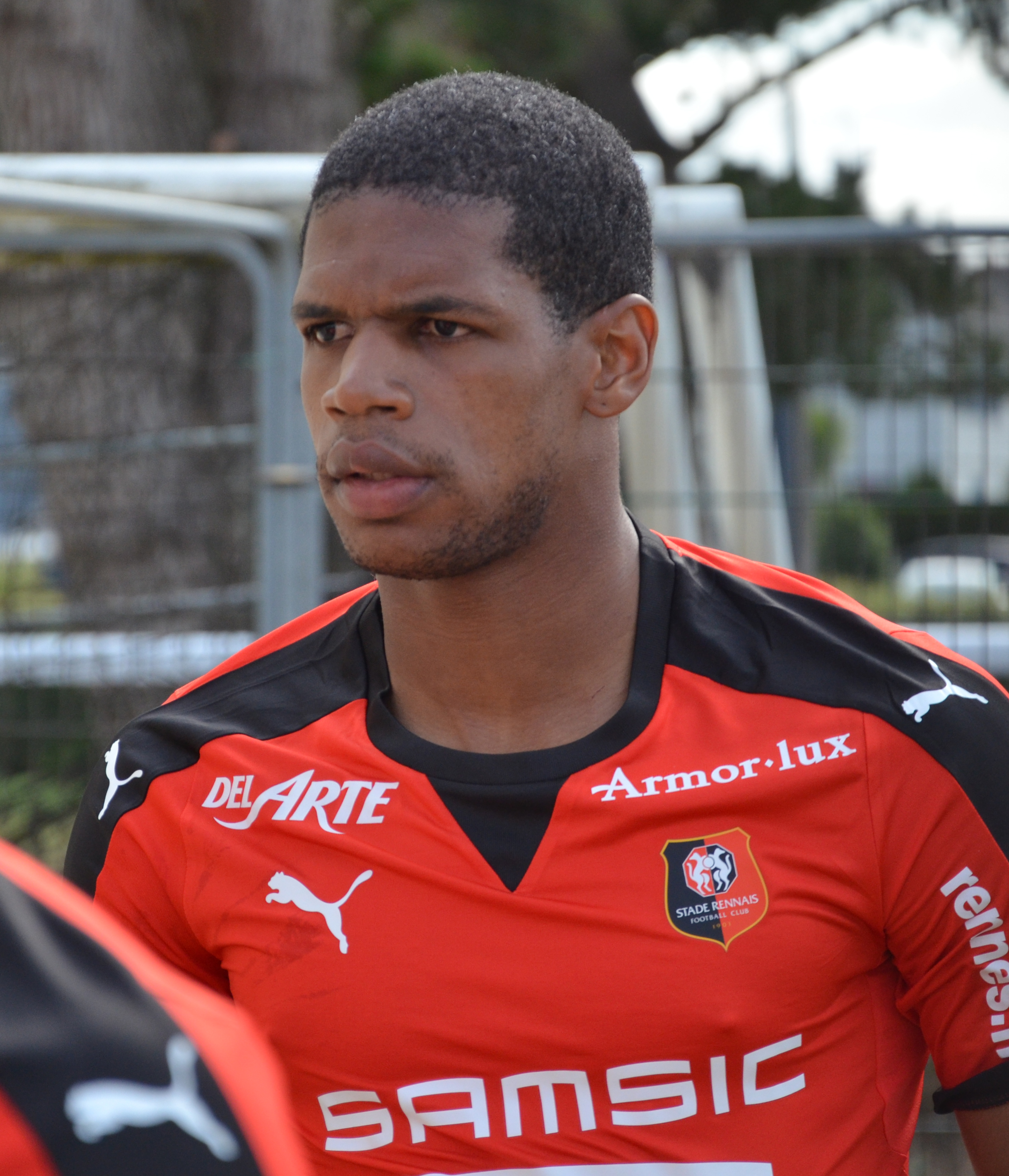 Photographie prise lors du match opposant le Stade rennais au Havre AC en amical au stade Paul-Audrin de Dinard le 8 juillet 2015. Ici, Ludovic Baal.